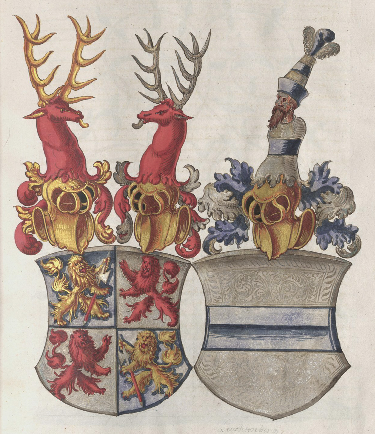 Wappen aus der Zimmerischen Chronik, Handschrift B, Württembergische Landesbibliothek Stuttgart, Cod. Don. 580a, S. 617, Allianzwappen Zimmern / Leuchtenberg